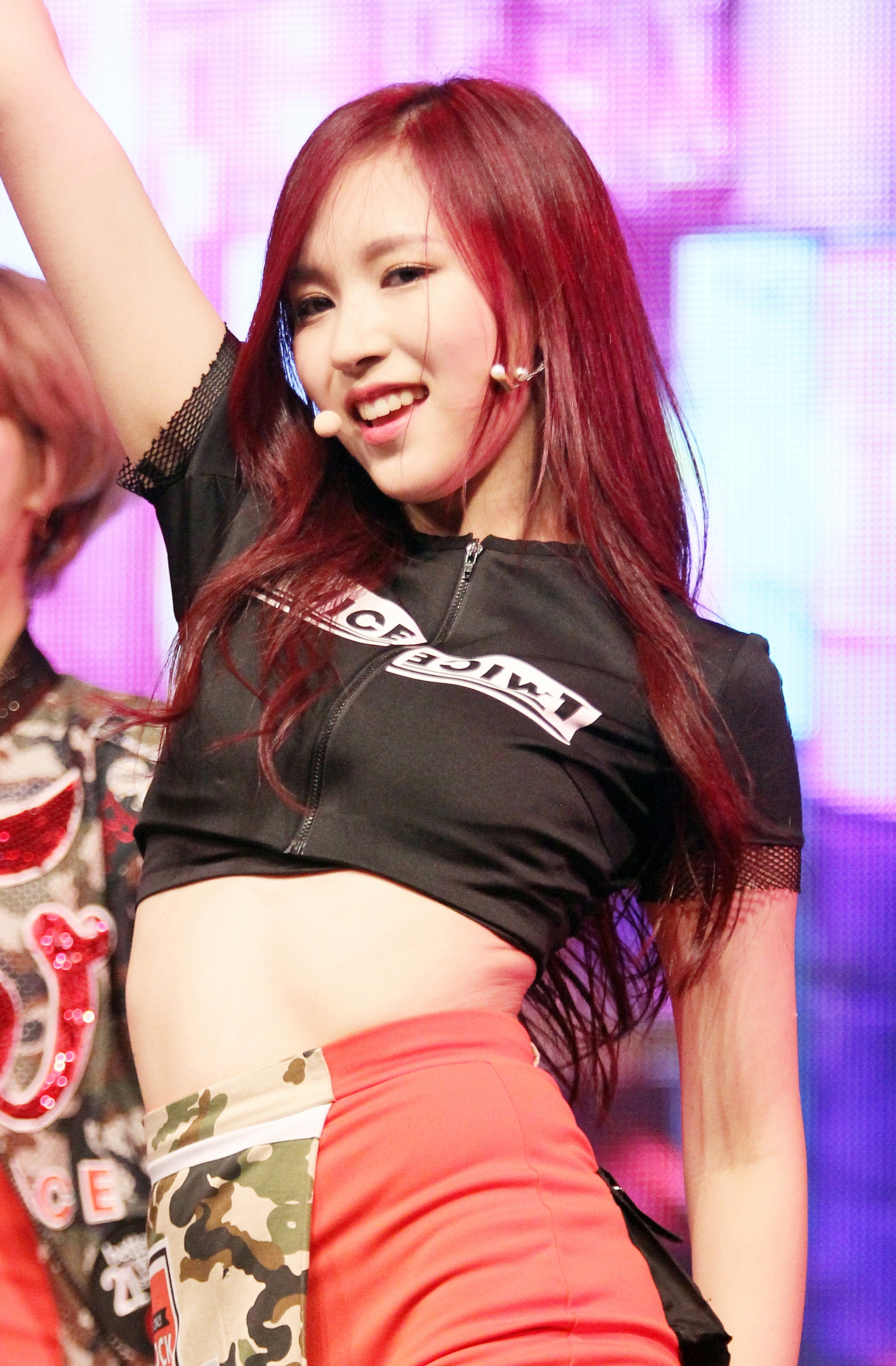 151020 트와이스 - 데뷔 쇼케이스 TWICE - Debut Showcase